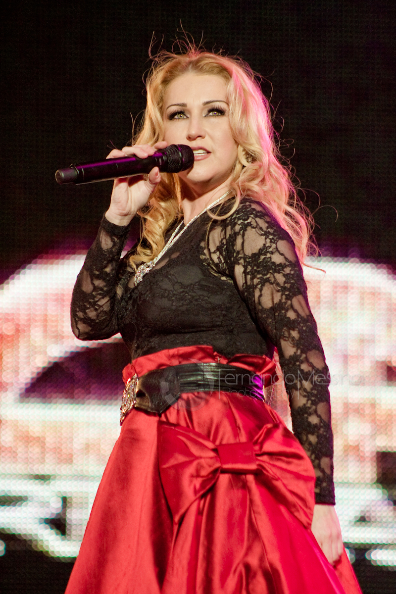 Alicia Villareal performing at Vive Grupero 2010